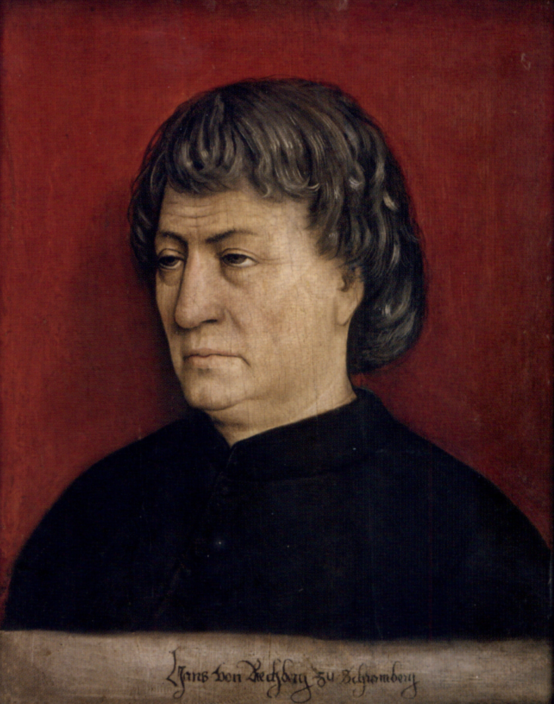 Portrait des Hans von Rechberg zu Schramberg, anonym, um 1460-1464, Lindenholz, 33 x 25.5 cm, Wien, KHM, Inv. Nr. 2998